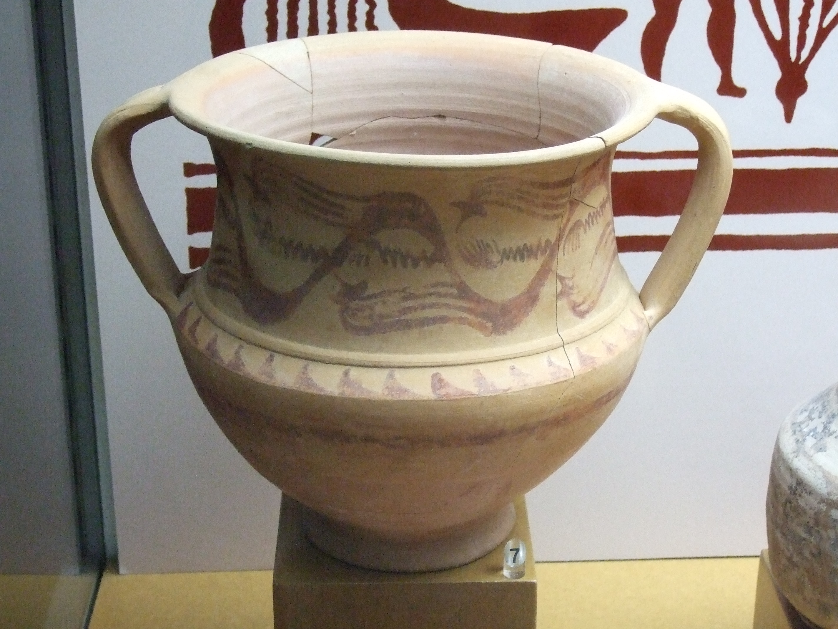 Crátera con decoración pintada. Cabezo de Alcalá (Azaila, Zaragoza) Siglo I adC. Museo de Zaragoza